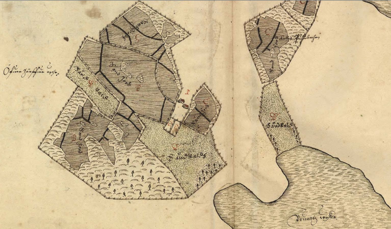 Solna socken Järva Nedre nr 1-2